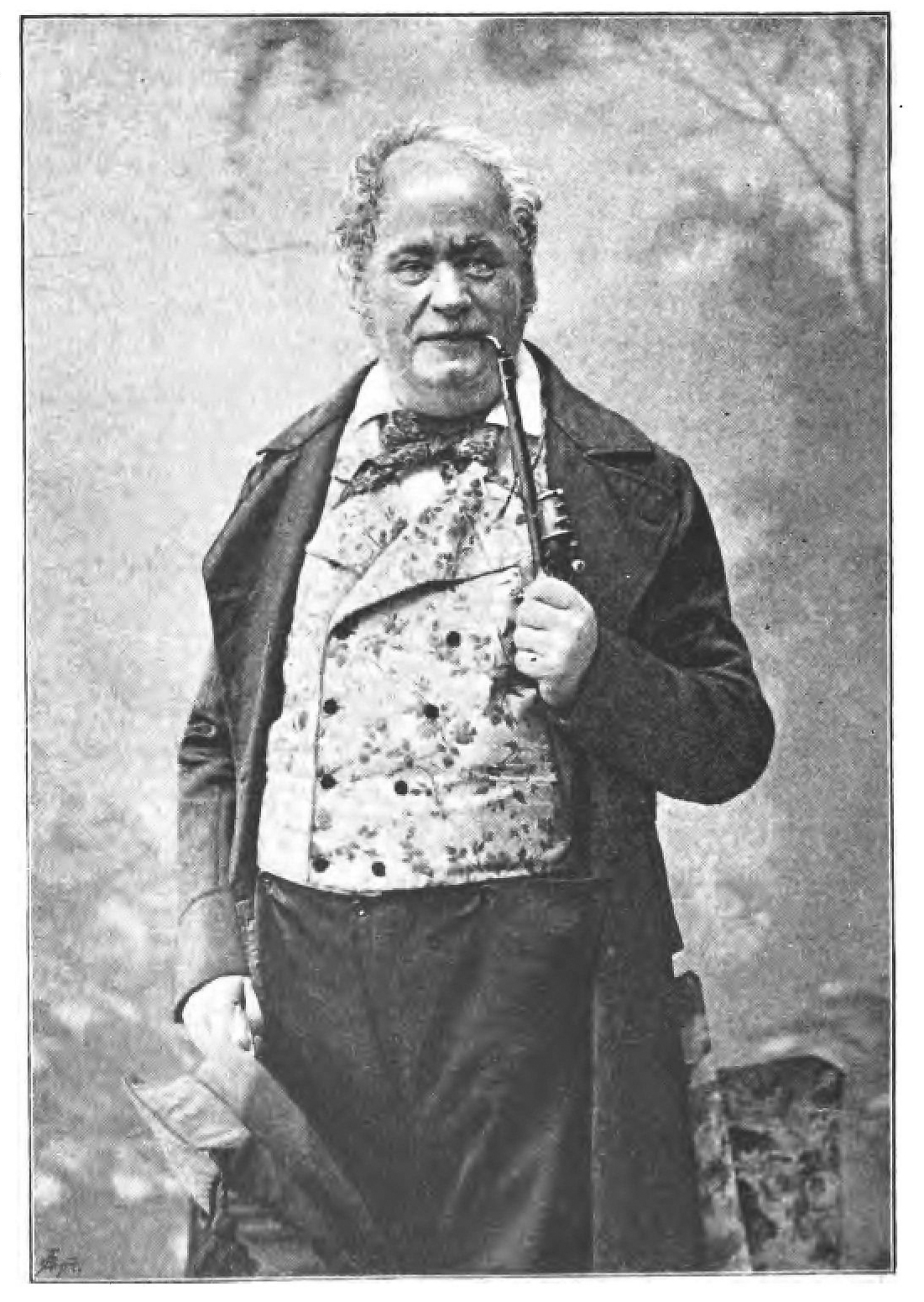 Victor Holmquist (1842-1895)